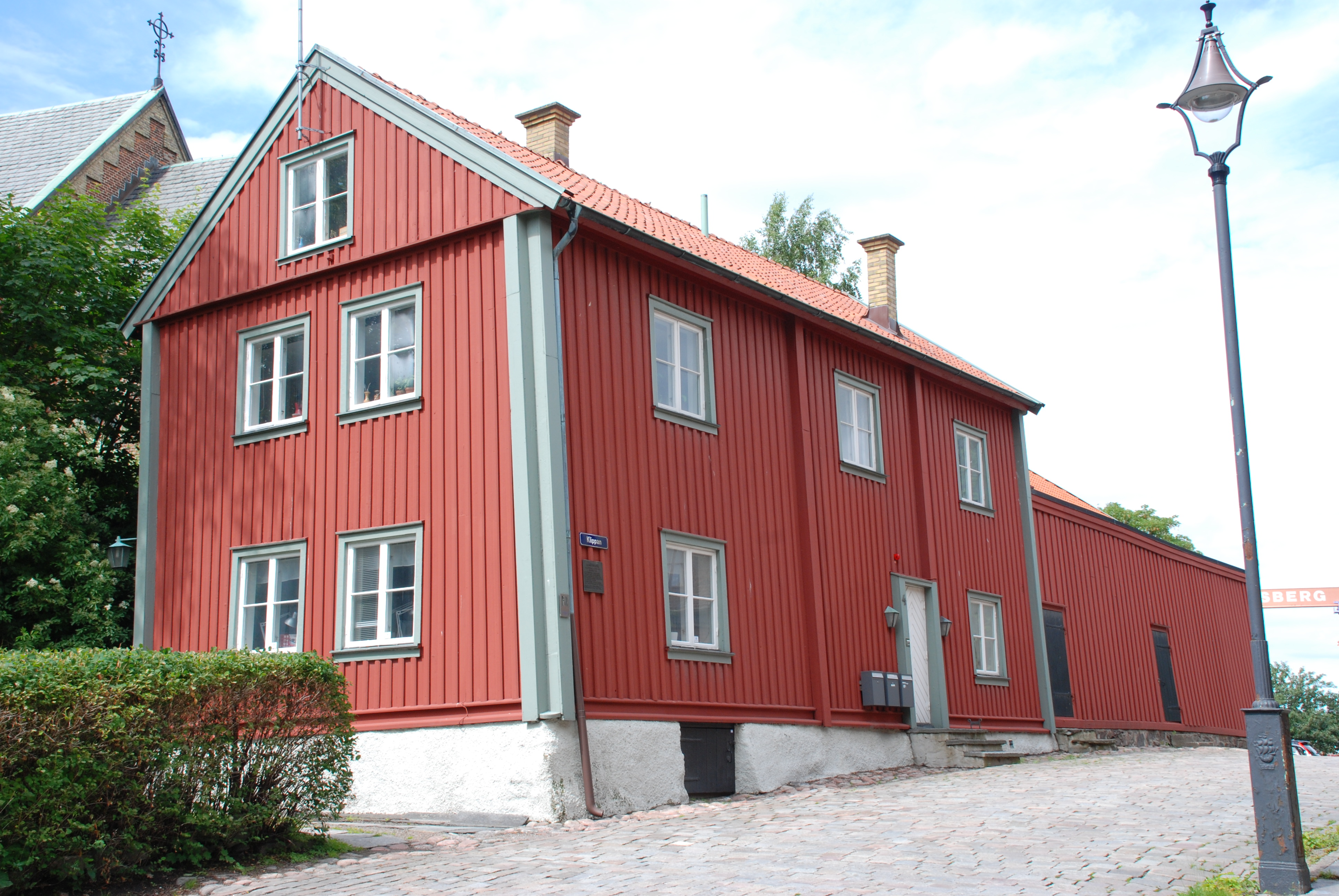 Klippans kulturreservat i stadsdelen Majorna i Göteborg. Klippan 4, uppfört 1762. Även benämnt "Palmens hus" efter sjökapten Palm. (Klippan 10)